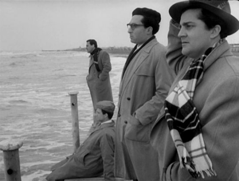 Screenshot del film I vitelloni (1953)